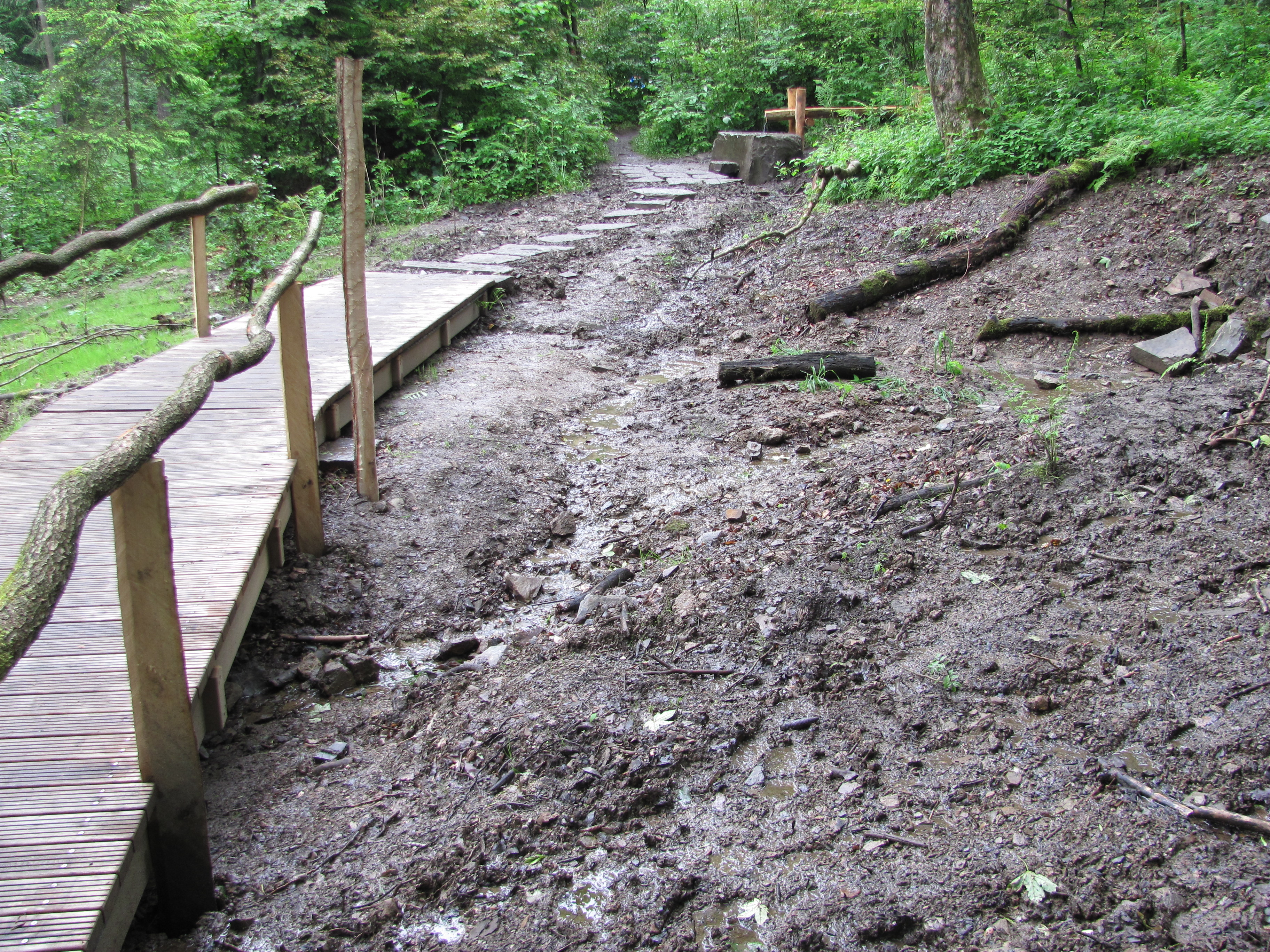 Zustand der Quelle im Sommer 2013. Die alte Einfassung wurde im Rahmen der Renaturierung entfernt.